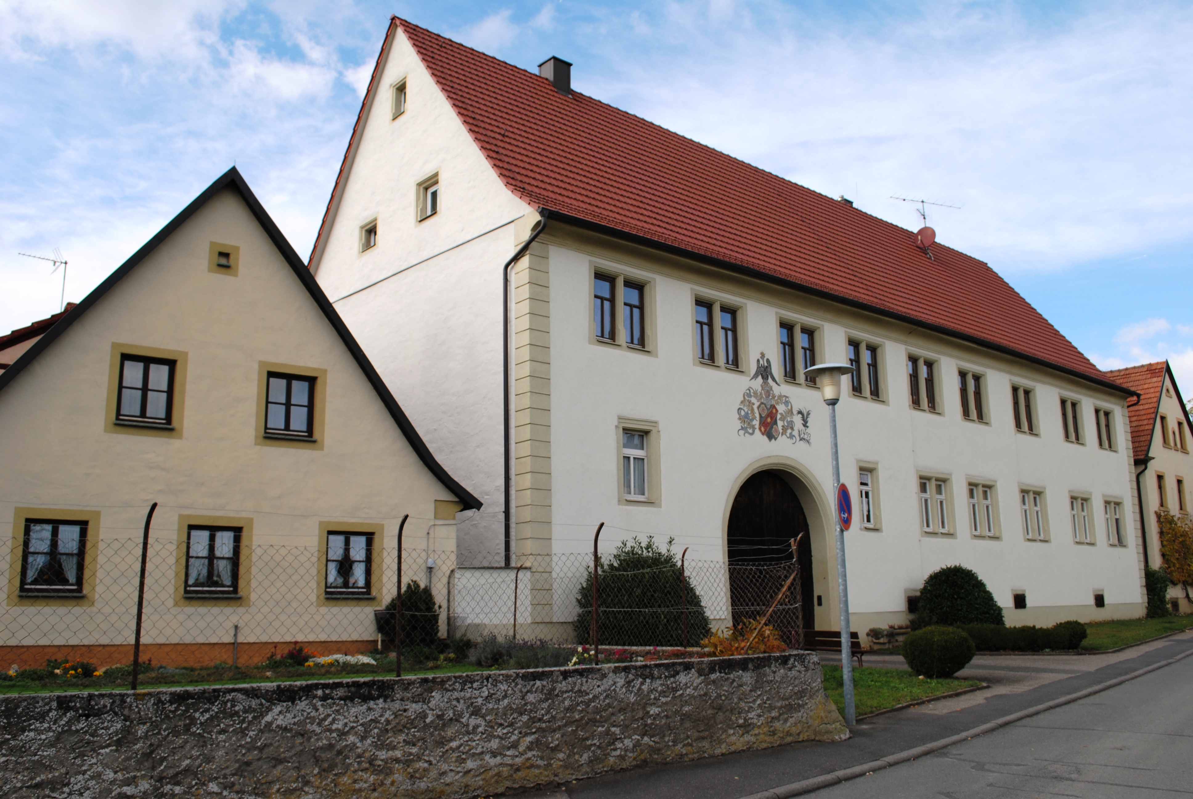 Hofanlage, Mainstraße 23, Schwarzach-Schwarzenau, zweigeschossiger Satteldachbau mit Tordurchfahrt und profilierten Fensterrahmungen, um 1600; aufgemaltes Wappen über der Tordurchfahrt, bez. 1493; D-6-75-165-35